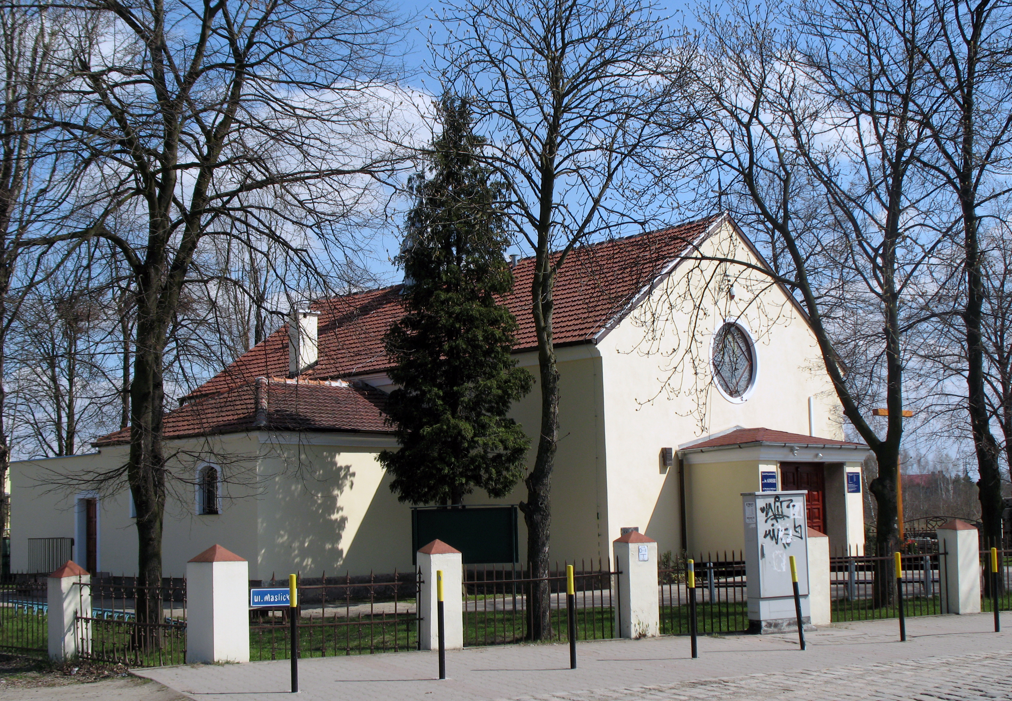 Wrocław, kościół pw. św. Agnieszki, ul. Śliwowa 3